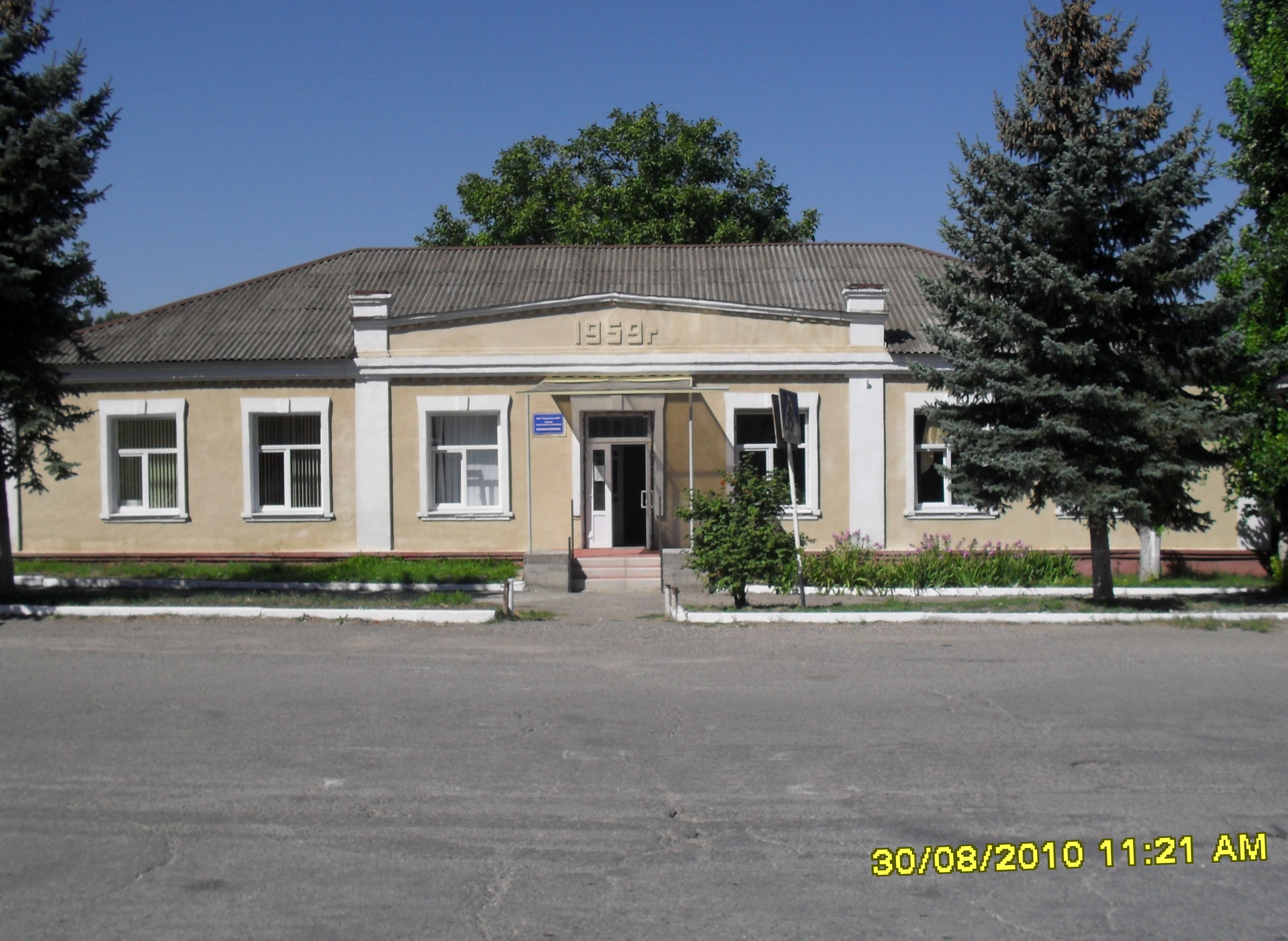 Юцкая участковаябольница Предгорного_района